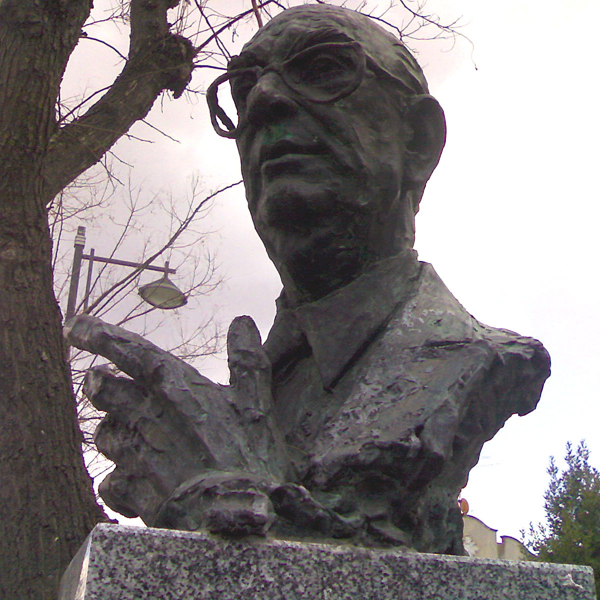 Busto de Camilo José Cela en el paseo de Fernández Iparraguirre de Guadalajara (España) realizado por Luis Sanguino.